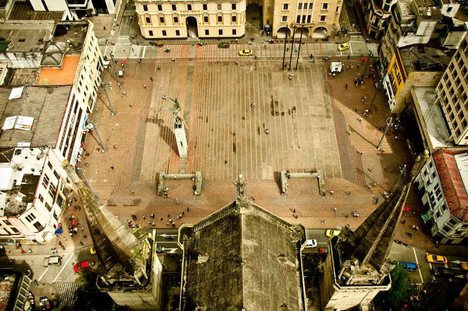 PLAZA BOLIVAR MANIZALES CALDAS COLOMBIA